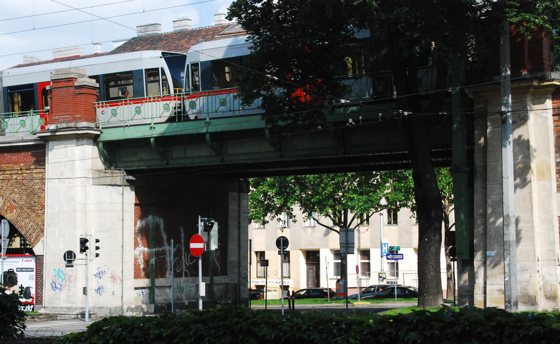 Die "Brücken über die Severingasse" im Zuge des Gürtelabschnittes der Wiener U-Bahnlinie U6